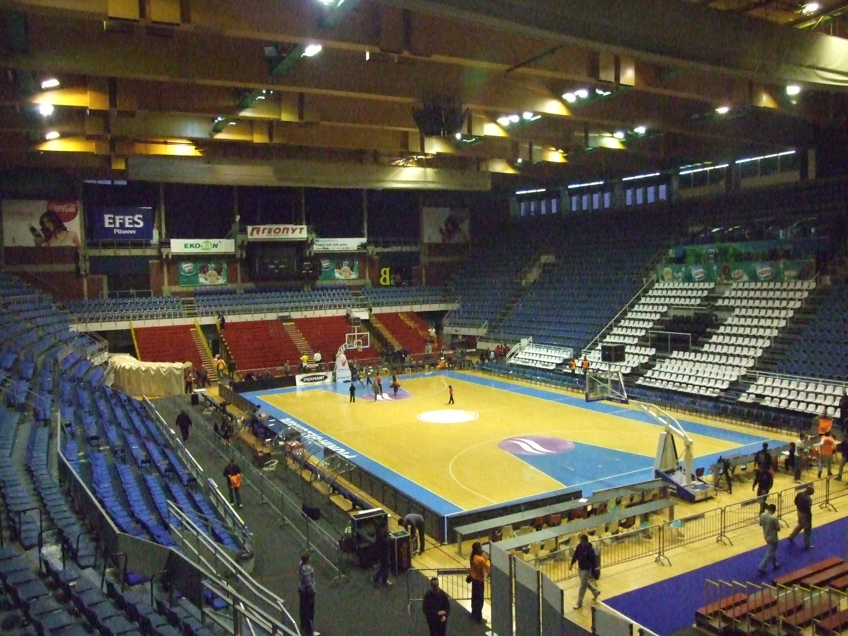 Унутрашњост хале Пионир у Београду. Фотографија направљена након кошаркашке утакмице.